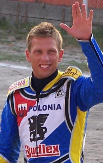 Andreas Jonsson przed meczem Polonii Bydgoszcz z WTS Wrocław